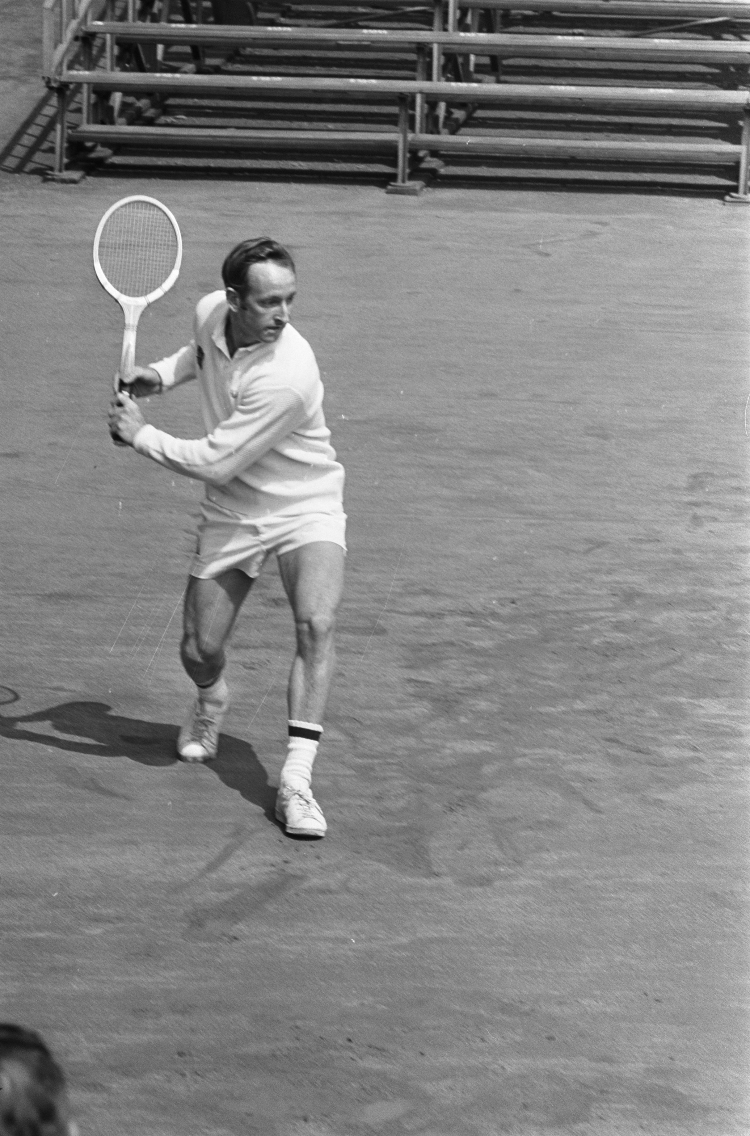 Collectie / Archief : Fotocollectie Anefo Reportage / Serie : [ onbekend ] Beschrijving : Top Tennis Toernooi 1969 in Amsterdam Rod Laver , aktie Datum : 22 mei 1969 Locatie : Amsterdam, Noord-Holland Trefwoorden : TENNIS, toernooien Fotograaf : Evers, Joost / Anefo Auteursrechthebbende : Nationaal Archief Materiaalsoort : Negatief (zwart/wit) Nummer archiefinventaris : bekijk toegang 2.24.01.05 Bestanddeelnummer : 922-4468